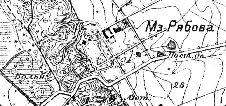 Мыза Рябово на карте 1895 года.